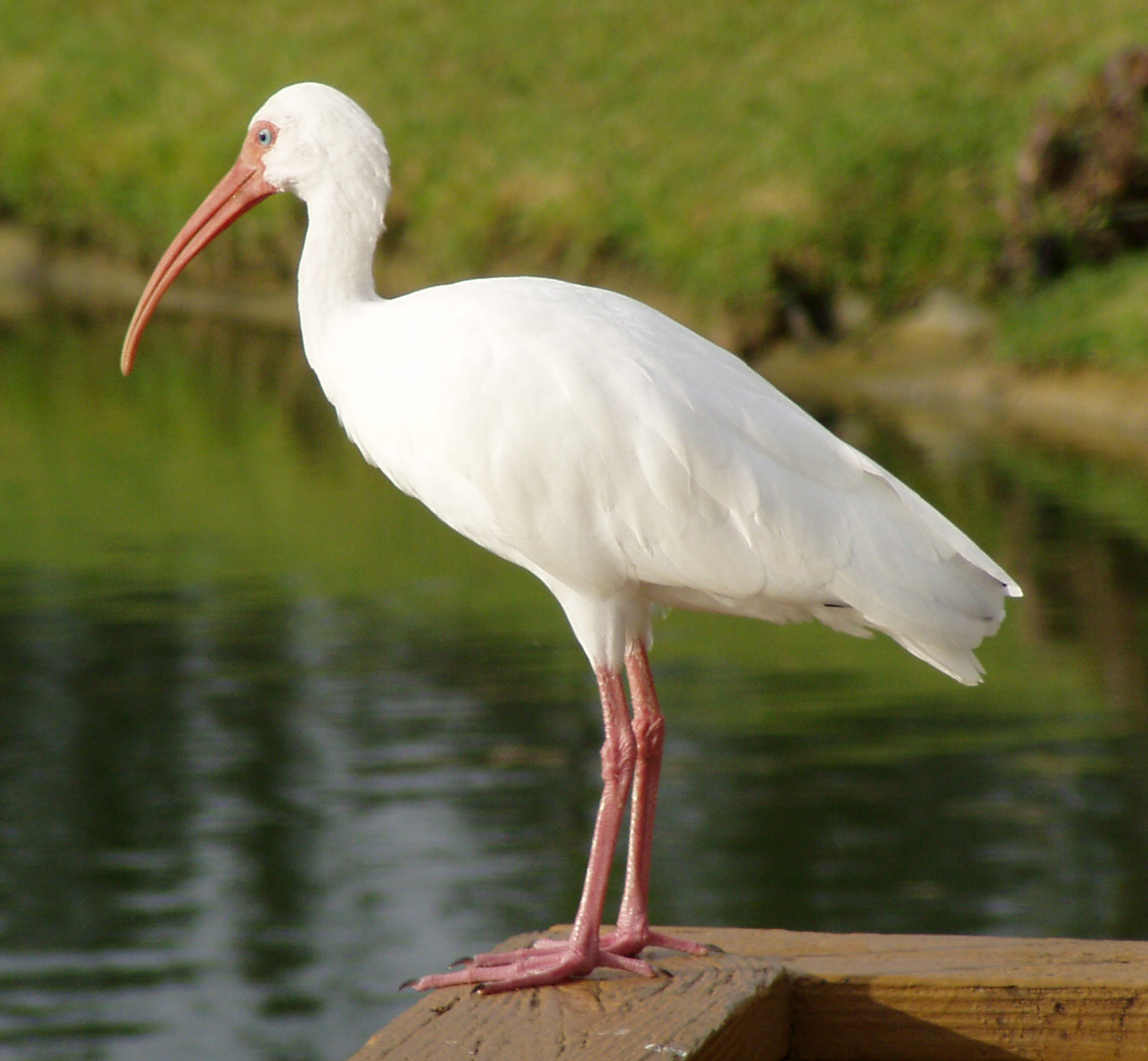 American White Ibis, adult, Margate, Florida.